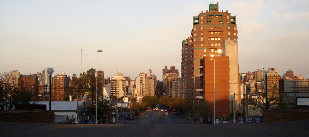 Barrio Nueva Córdoba visto desde la plazoleta ubicada en la Avenida Pueyrredón. Córdoba (Argentina). Эрзянь: Nueva Cordoba neighborhood seen from small square on Pueyrredon avenue. Cordoba, Argentina.